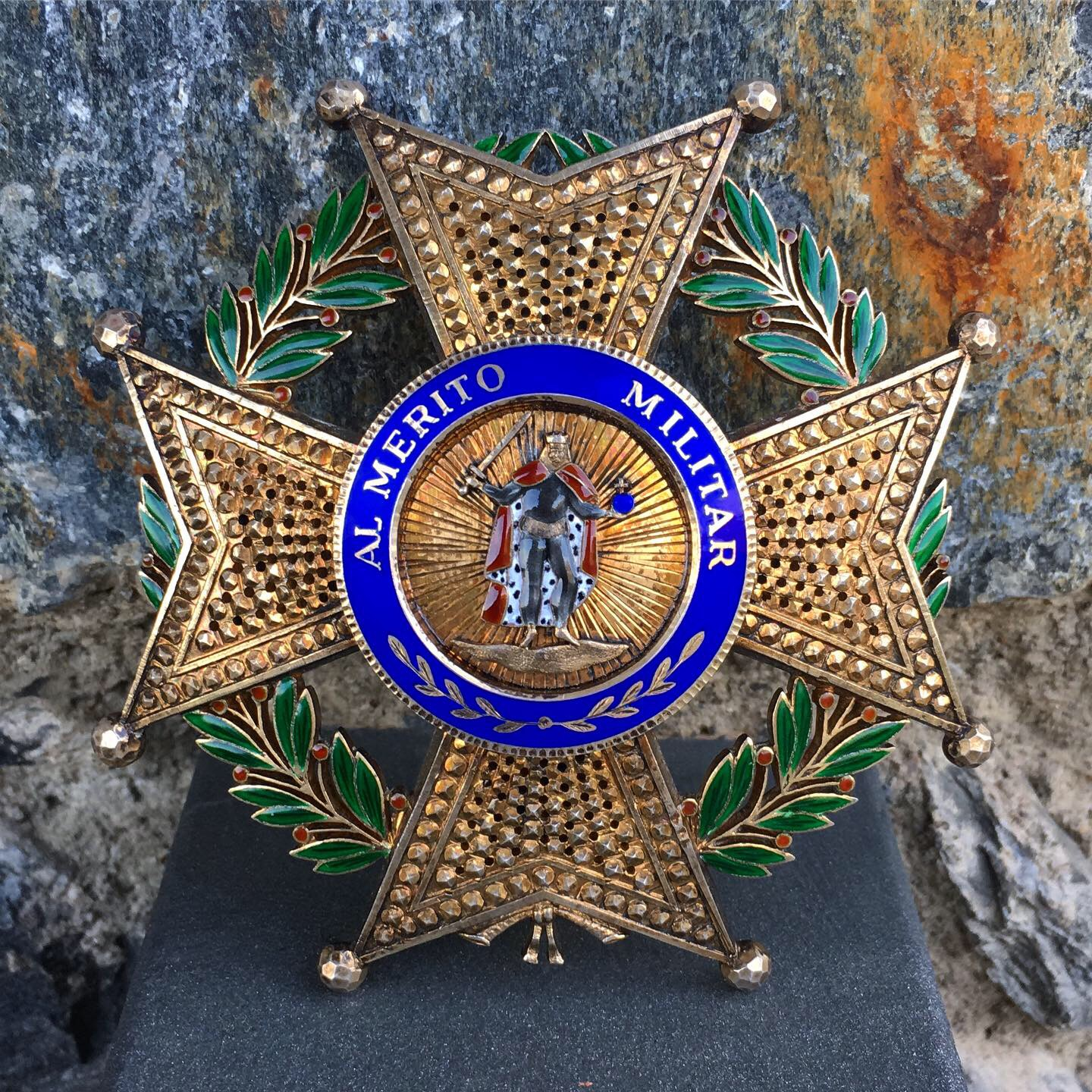 Gran Cruz Laureada de la Real y Militar Orden de San Fernando, Reino de España Colección particular.